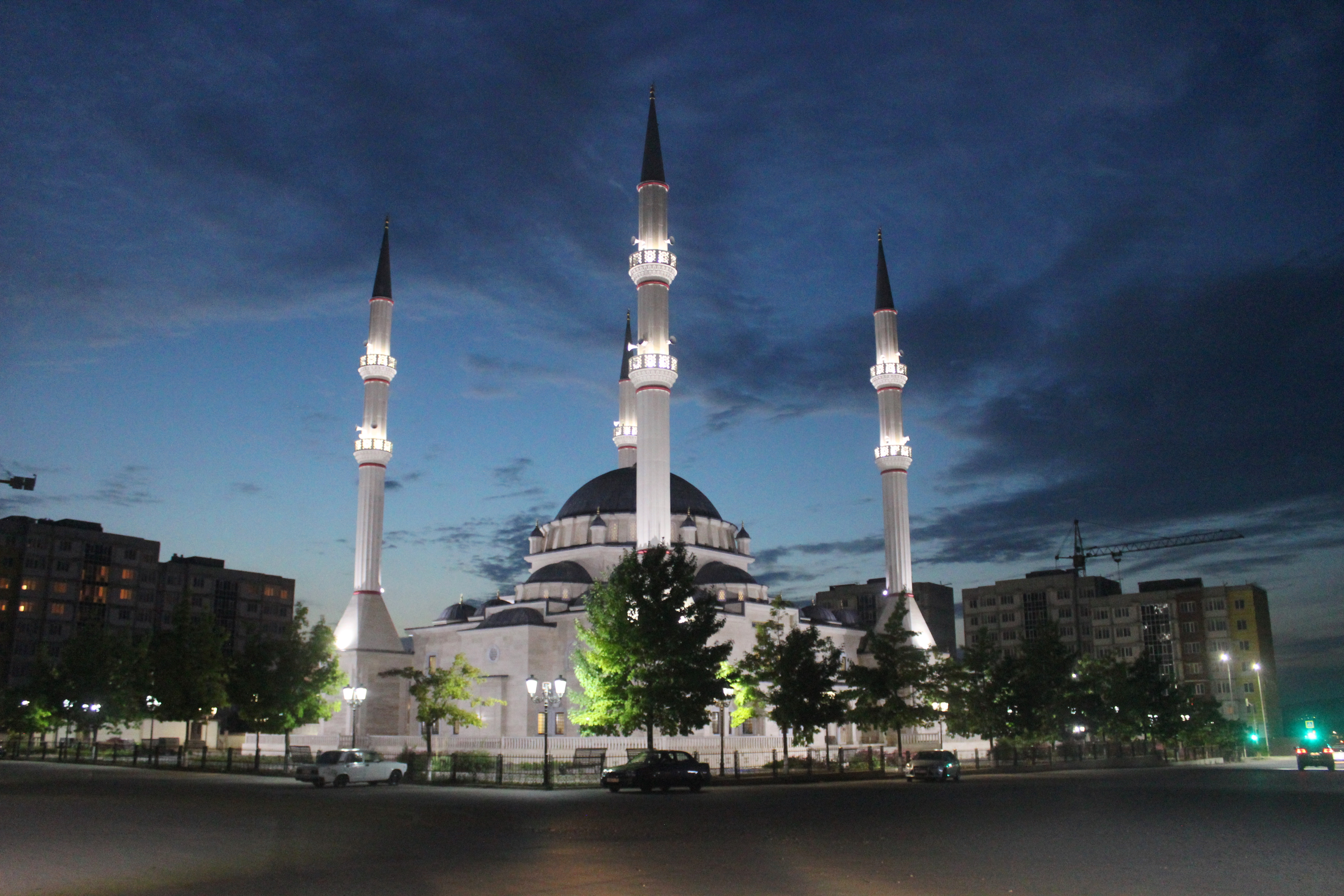 Соборная мечеть города Курчалой